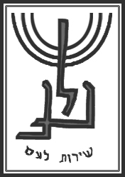 noar lenoar logo